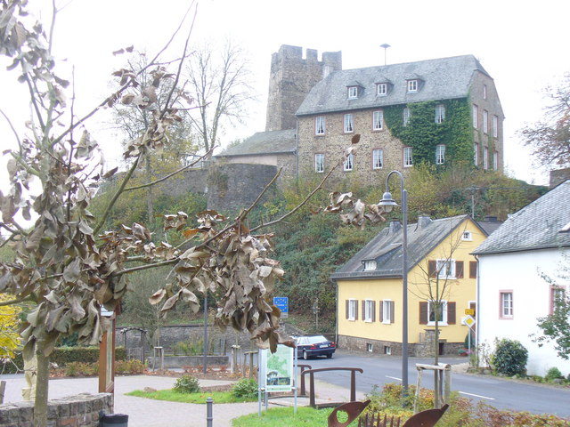 Mittelalterliches Burg, Dasburg